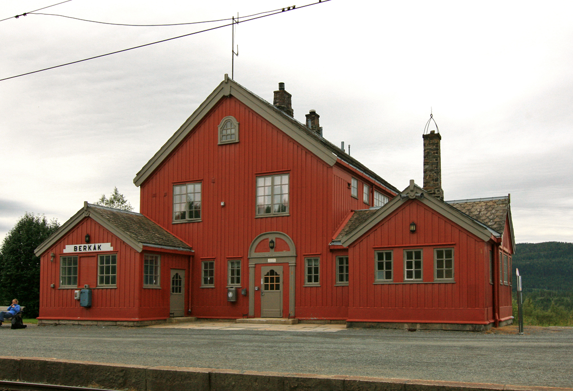 Berkåk stasjon, Dovrebanen. Bygd 1921. NSBs arkitektkontor.